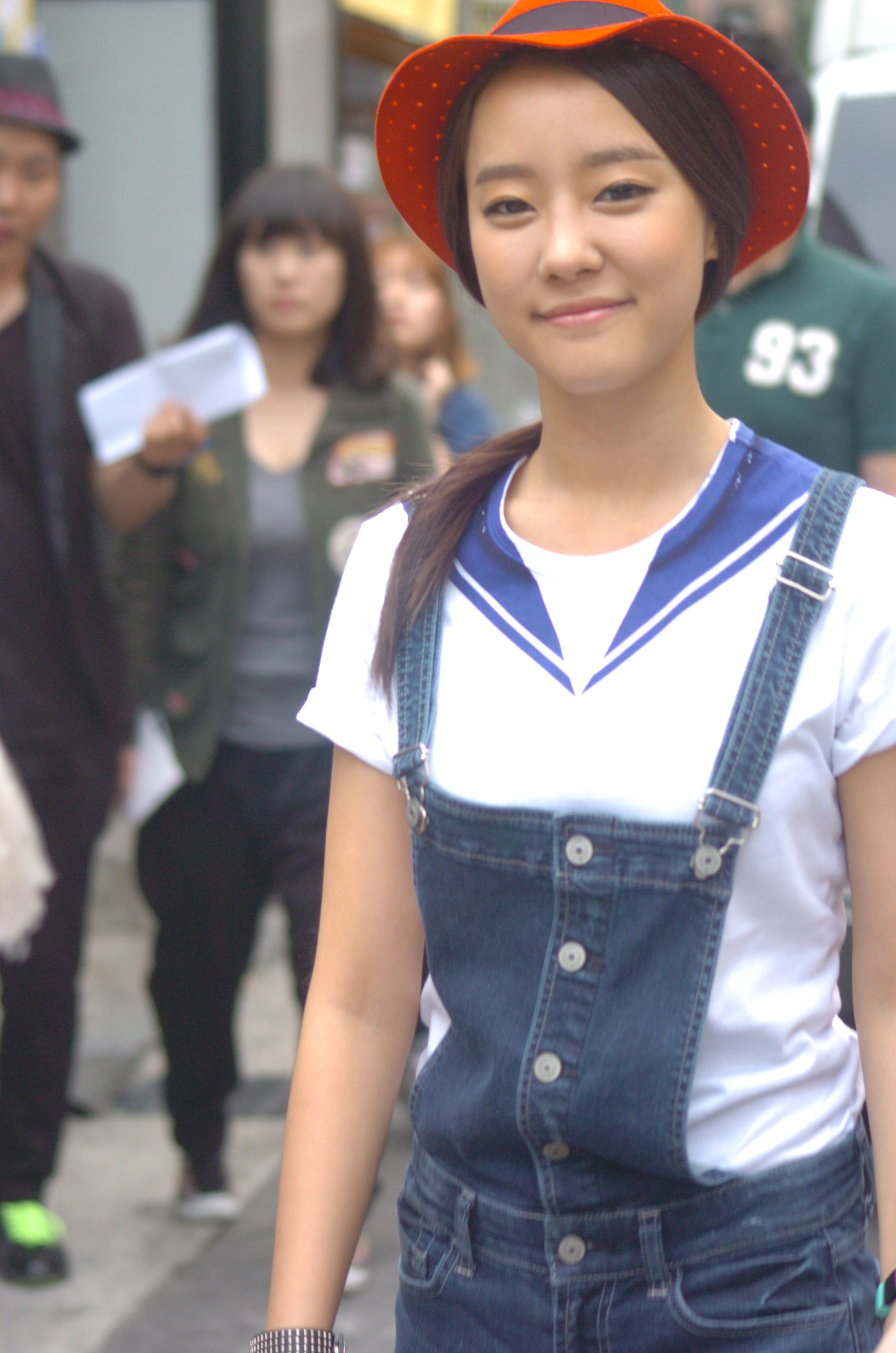 레슬링 시즌 & EXR 푸시 버튼과 콜라보레이션 런칭 10주년